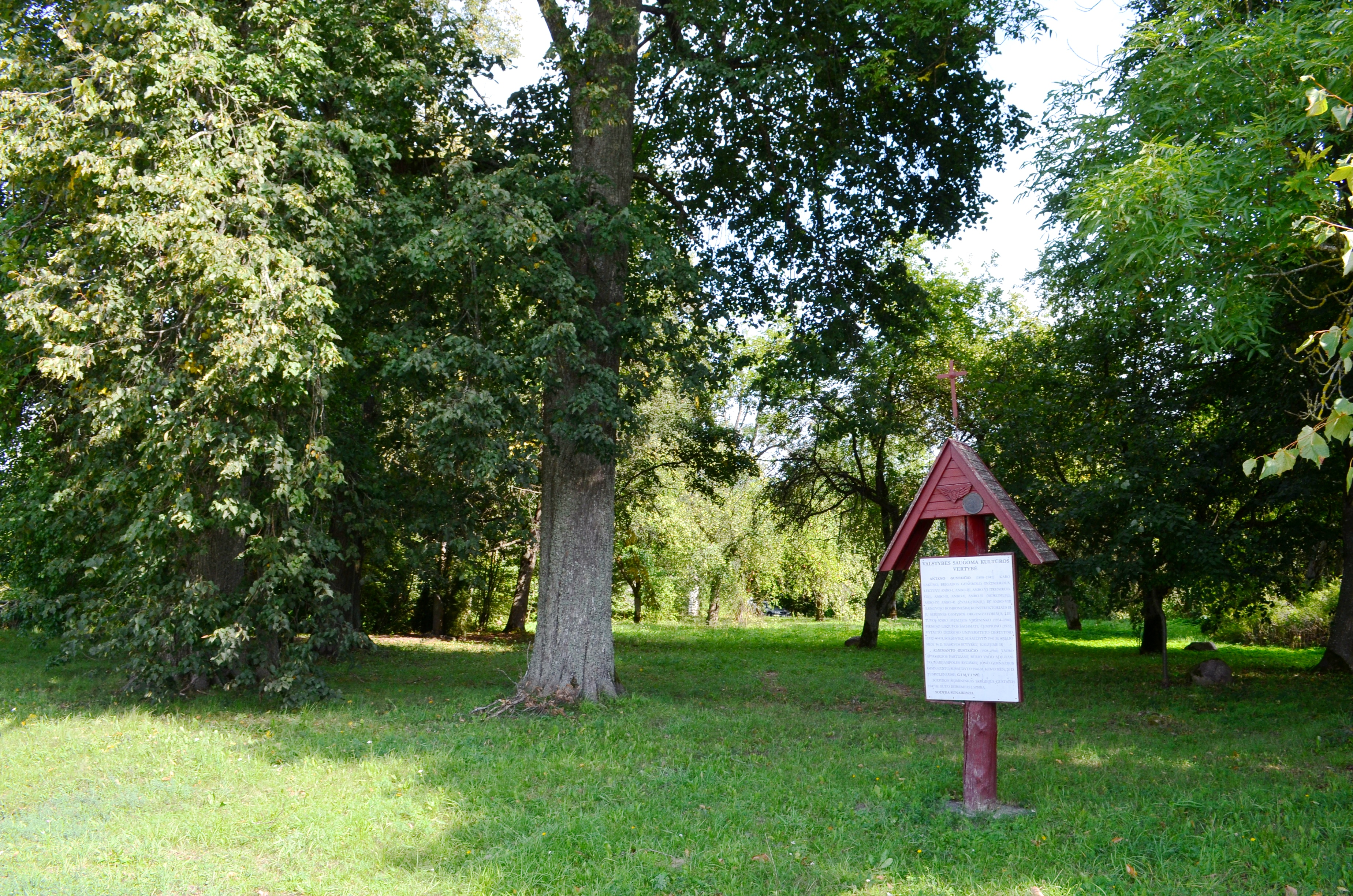 A. Gustaičio sodybvietė, Obelinė, Sasnavos sen., Marijampolės sav.